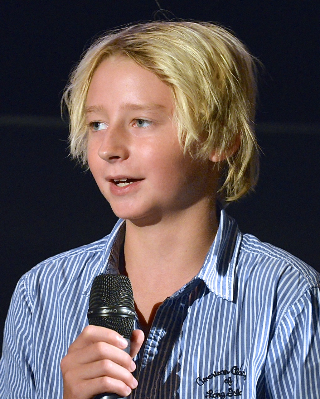 William Ringström under presentationen av den Svenska filmhösten 2014 i Filmhuset i Stockholm den 18 augusti 2014.